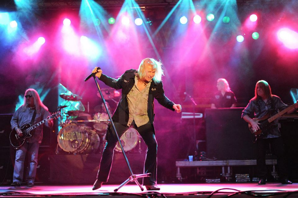 Konzert der Band Uriah Heep im Sommer 2011. Sänger Bernie Shaw in der Bildmitte.